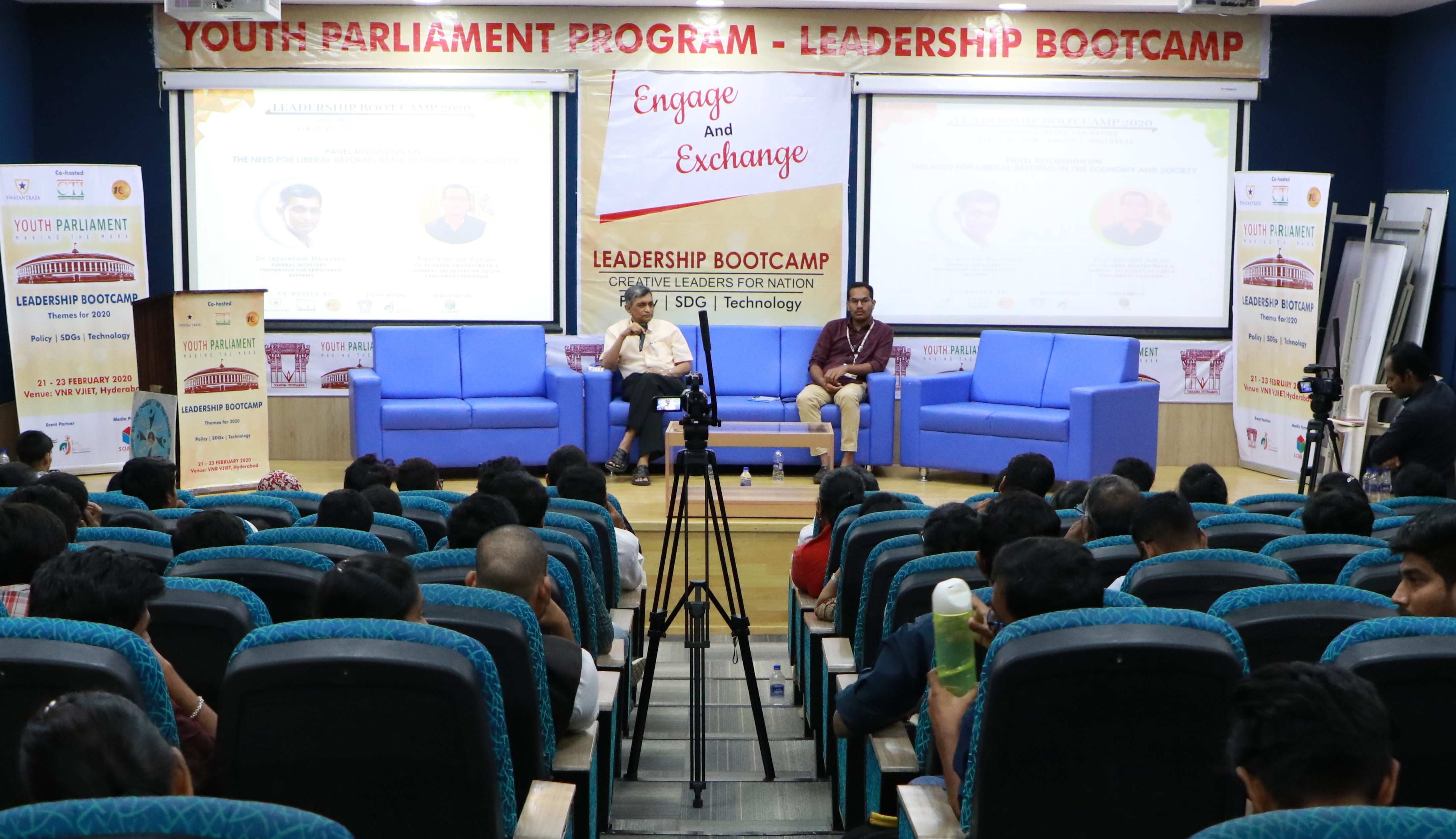 లీడర్‌షిప్ బూట్ క్యాంప్ (ఎల్‌బిసి)లో ప్రసంగిస్తున్న రాఘవేందర్ అస్కాని, డా. జయప్రకాశ్ నారాయణ్